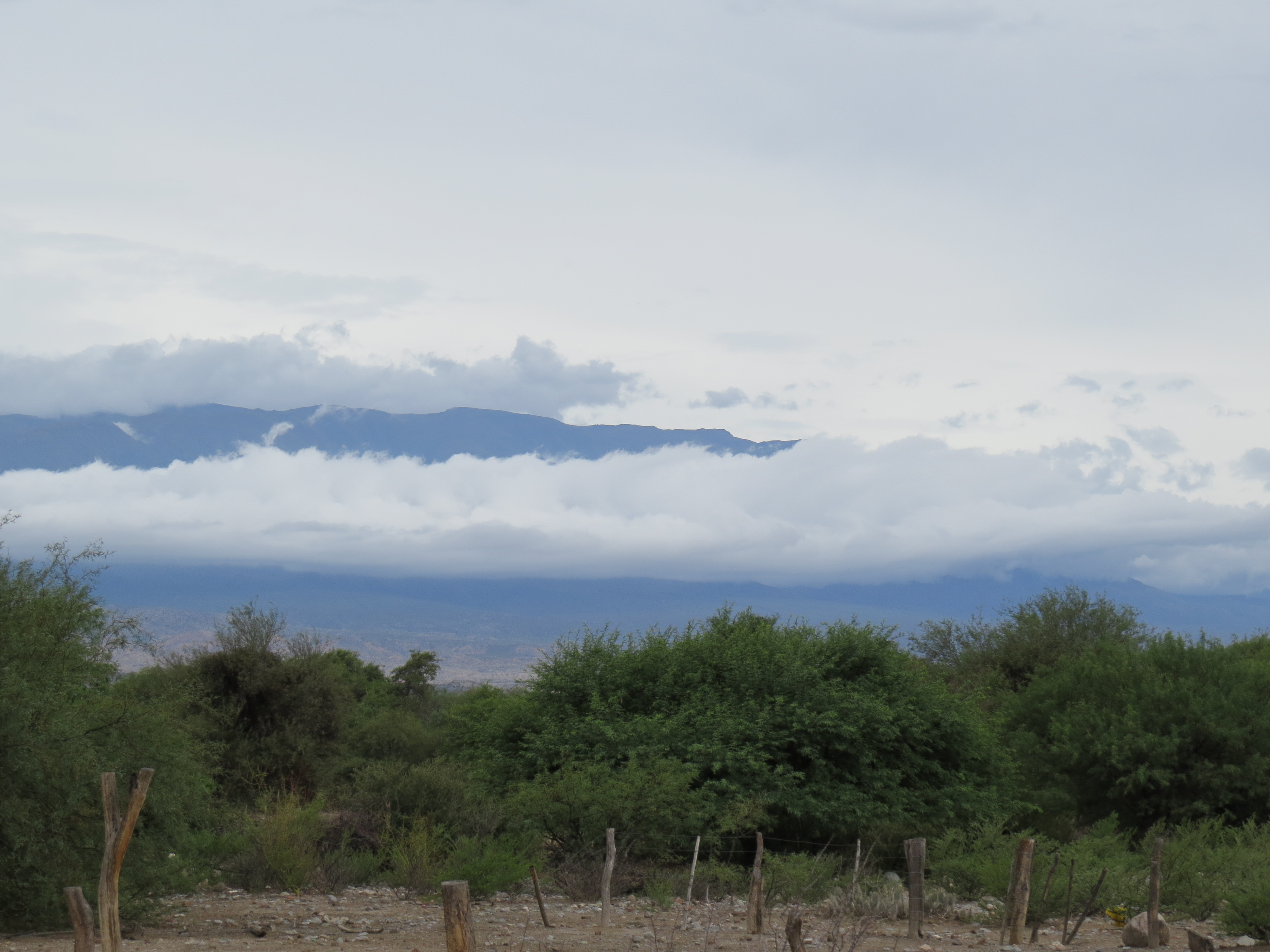 Colalao del Valle, Provincia de Tucumán.